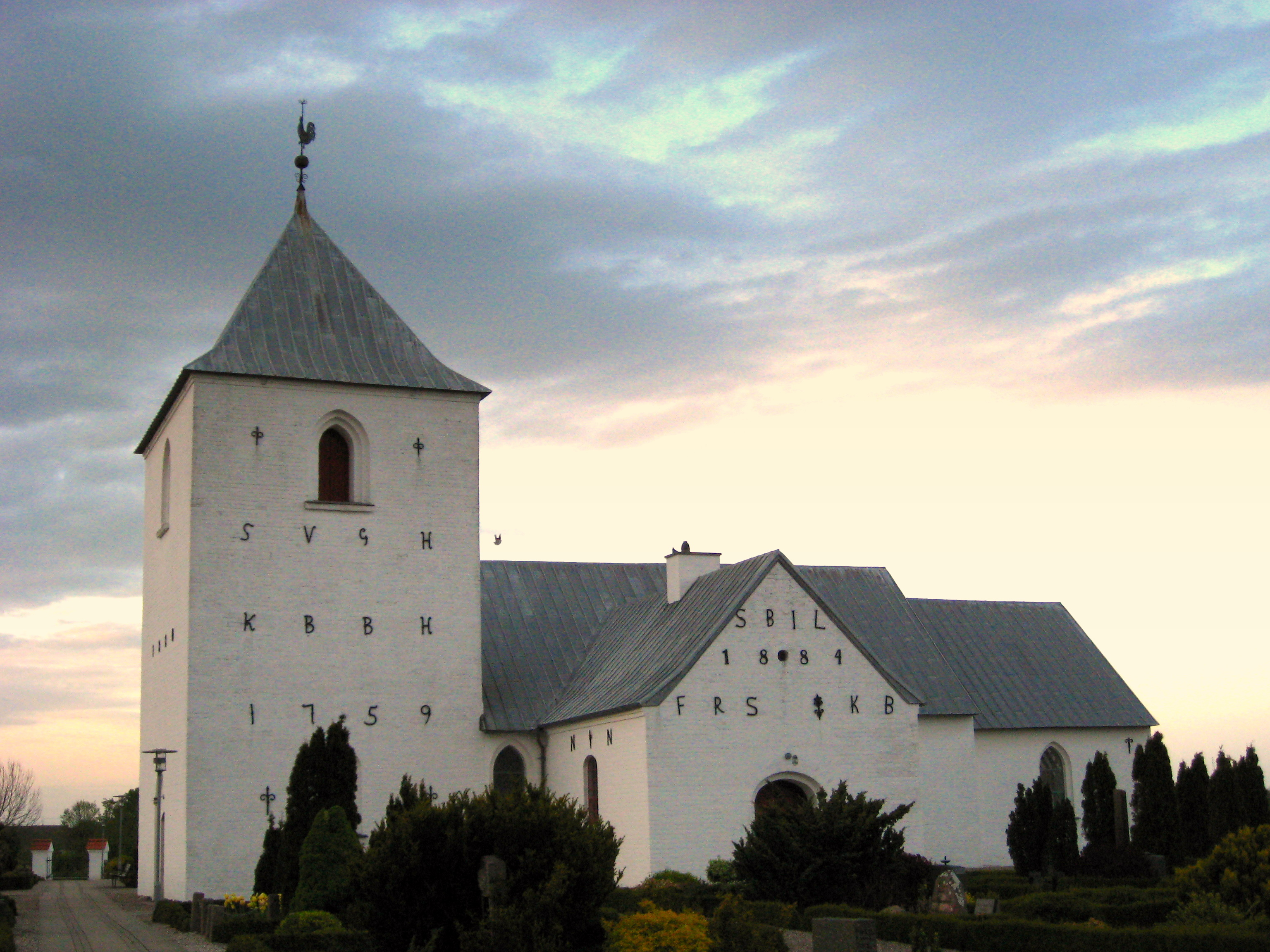 Ajstrup Kirke, Aalborg Kommune